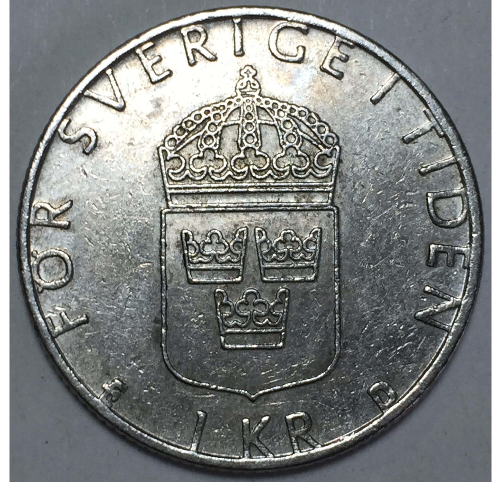 Rückseite Münze 1 Krone Schweden 1991